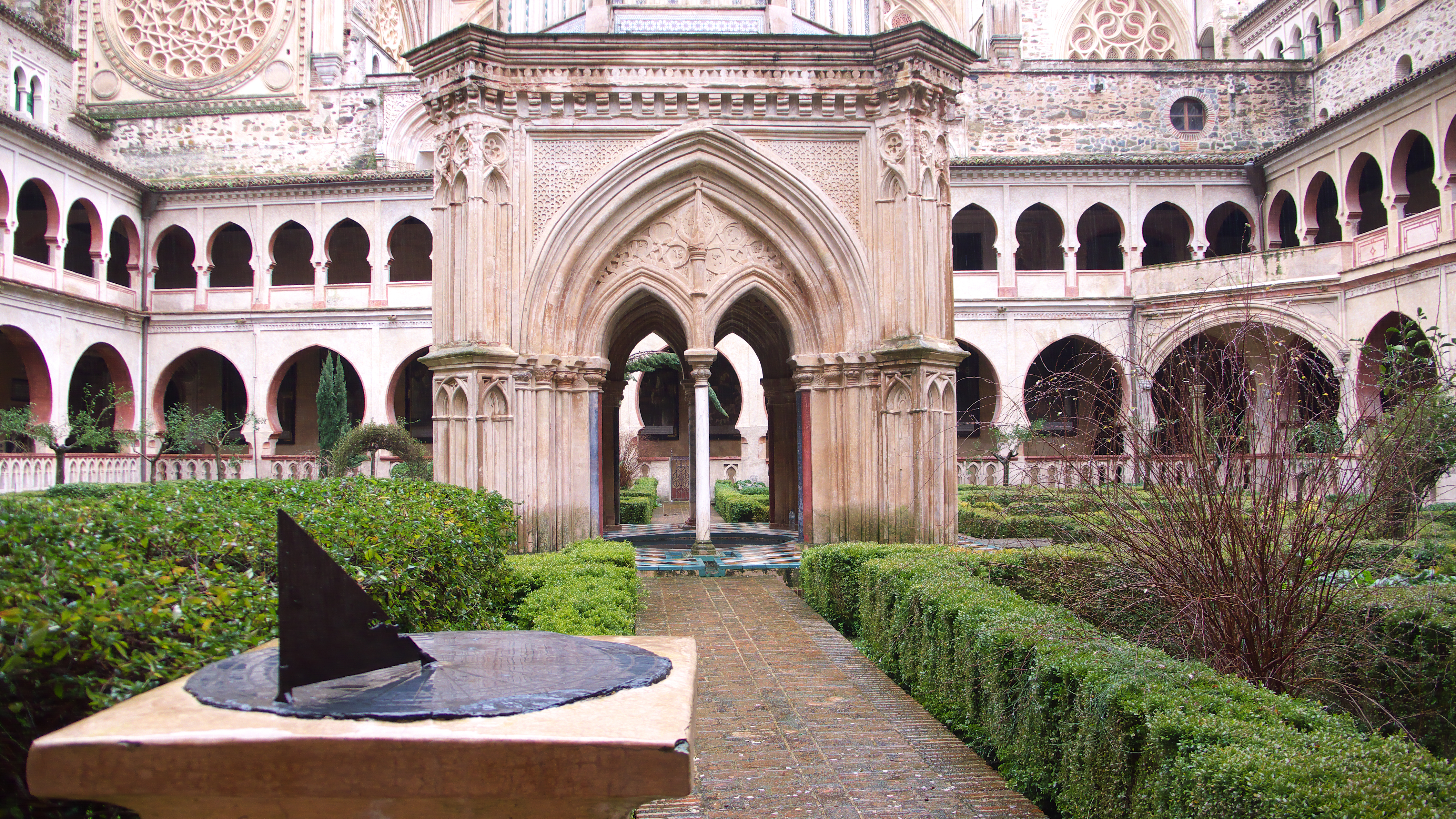 Claustro de los Milagros (1389-1405), atribuido a fray Juan de Sevilla.